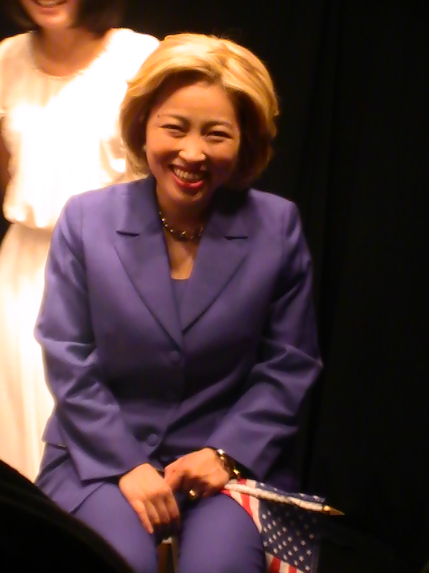 石井てる美 (2016年11月)